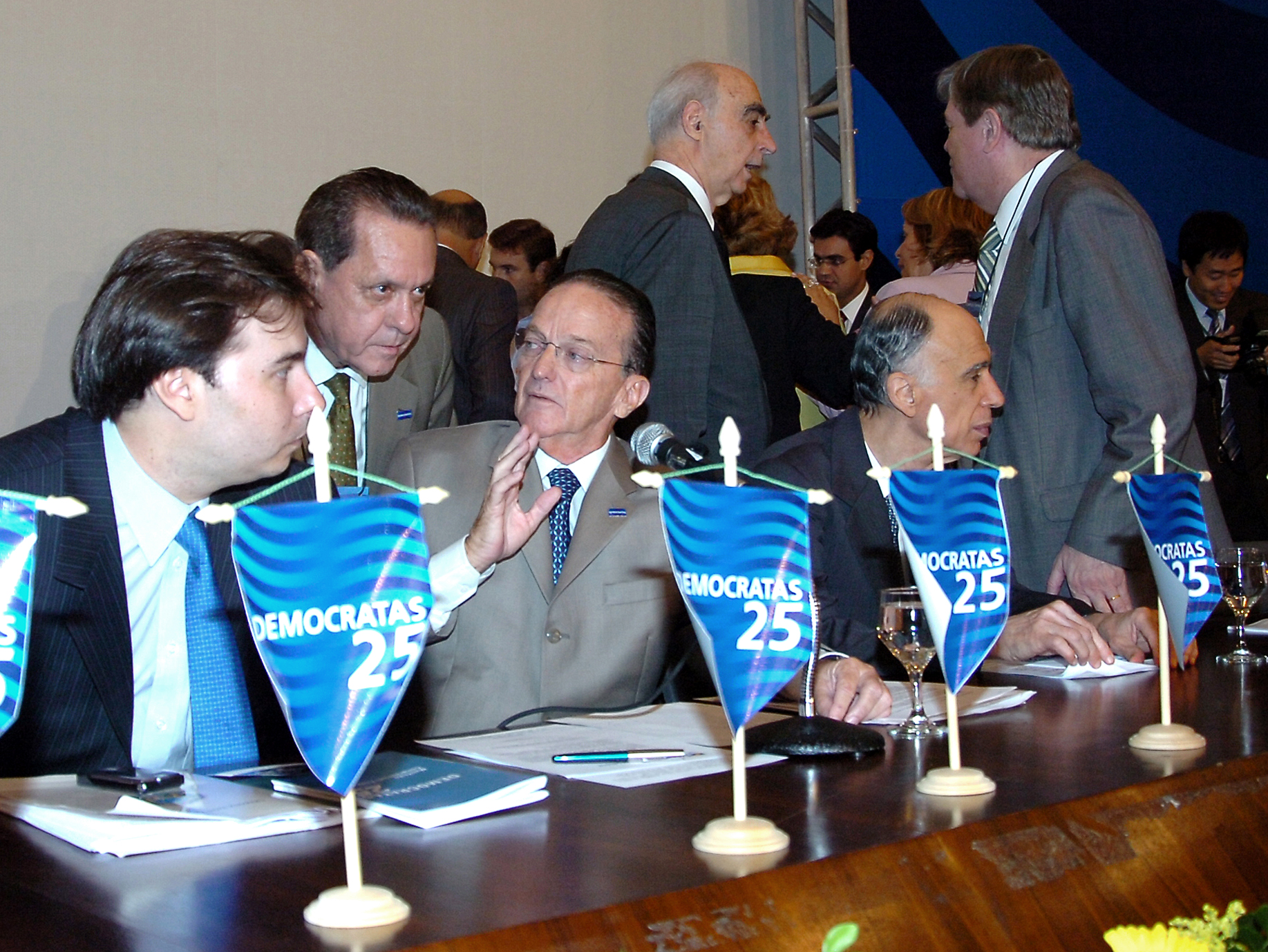 Líderes dos Democratas, na conveção extraordinaria que refundou o partido, antigo PFL.